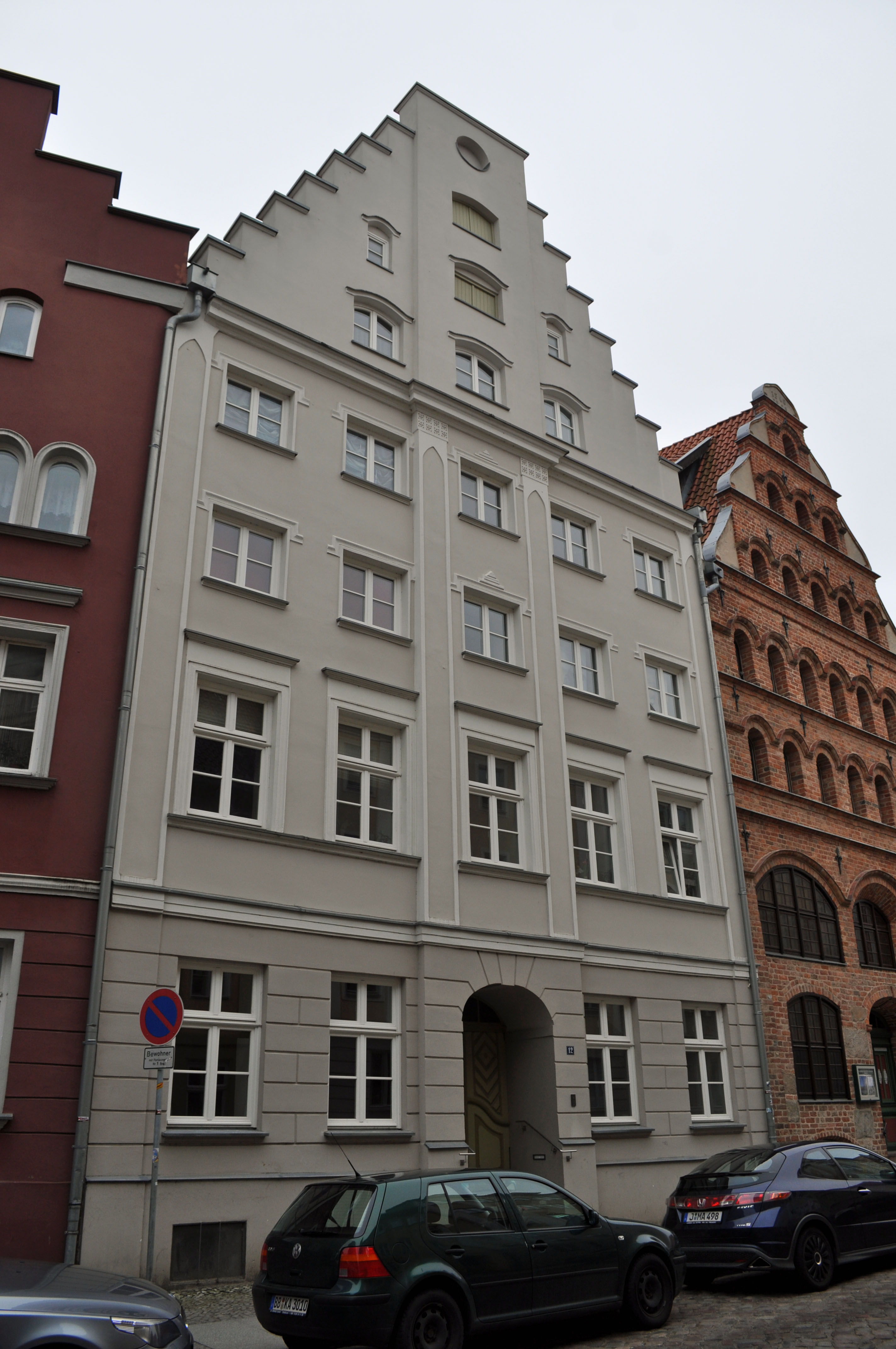 Gebäude bzw. Gebäudedetail in Stralsund. Straße und Hausnummer siehe Dateiname.